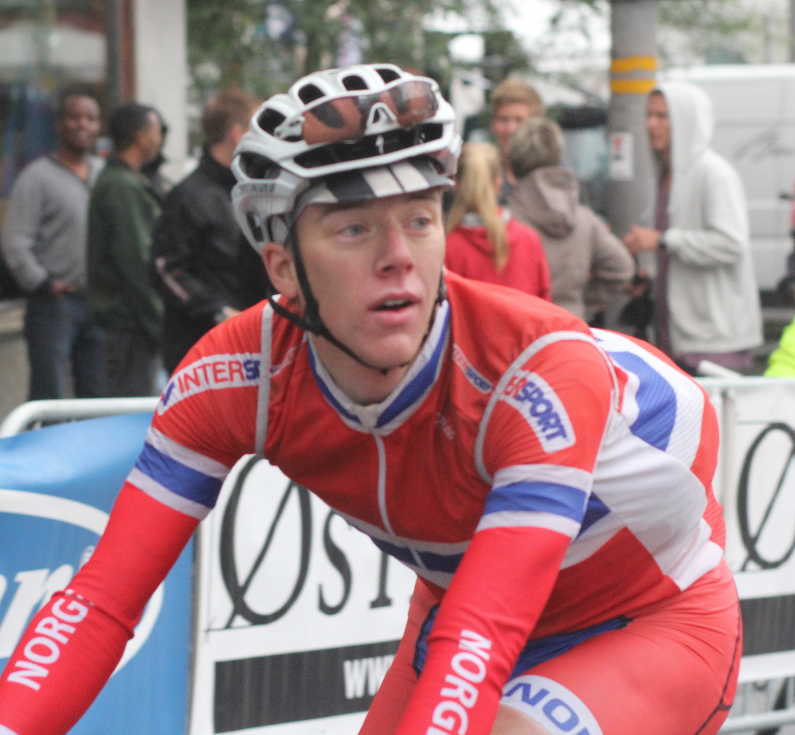 Åsmund Løvik under Tour des Fjords